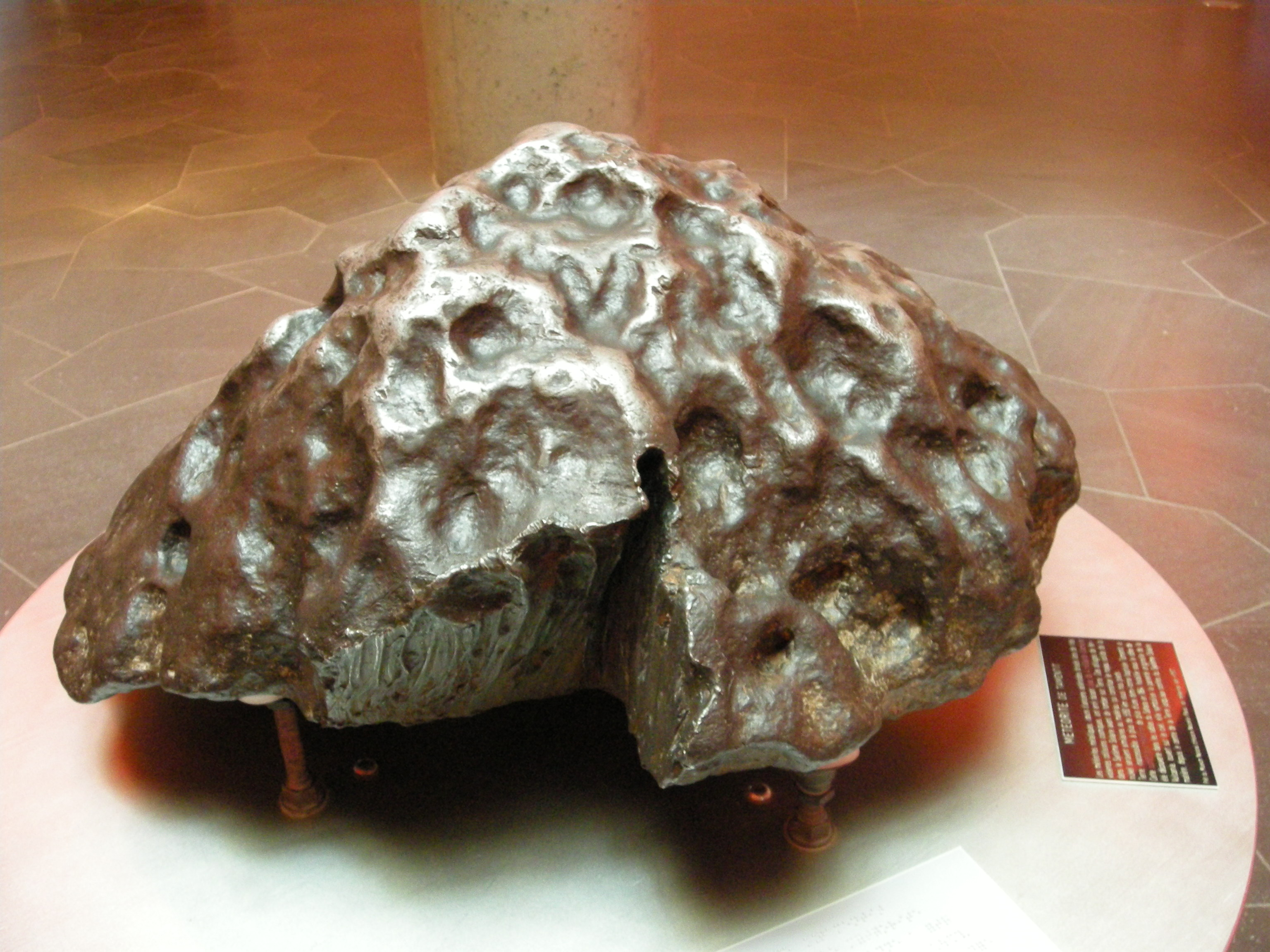 Météorite d'un poids d'une demi-tonne, baptisée Tamentit, ayant été découverte dans les sables du Sahara en 1864. Actuellement exposée au Parc Vulcania (Puy-de-Dôme). Prêt du Museum national d'Histoire naturelle de Paris.